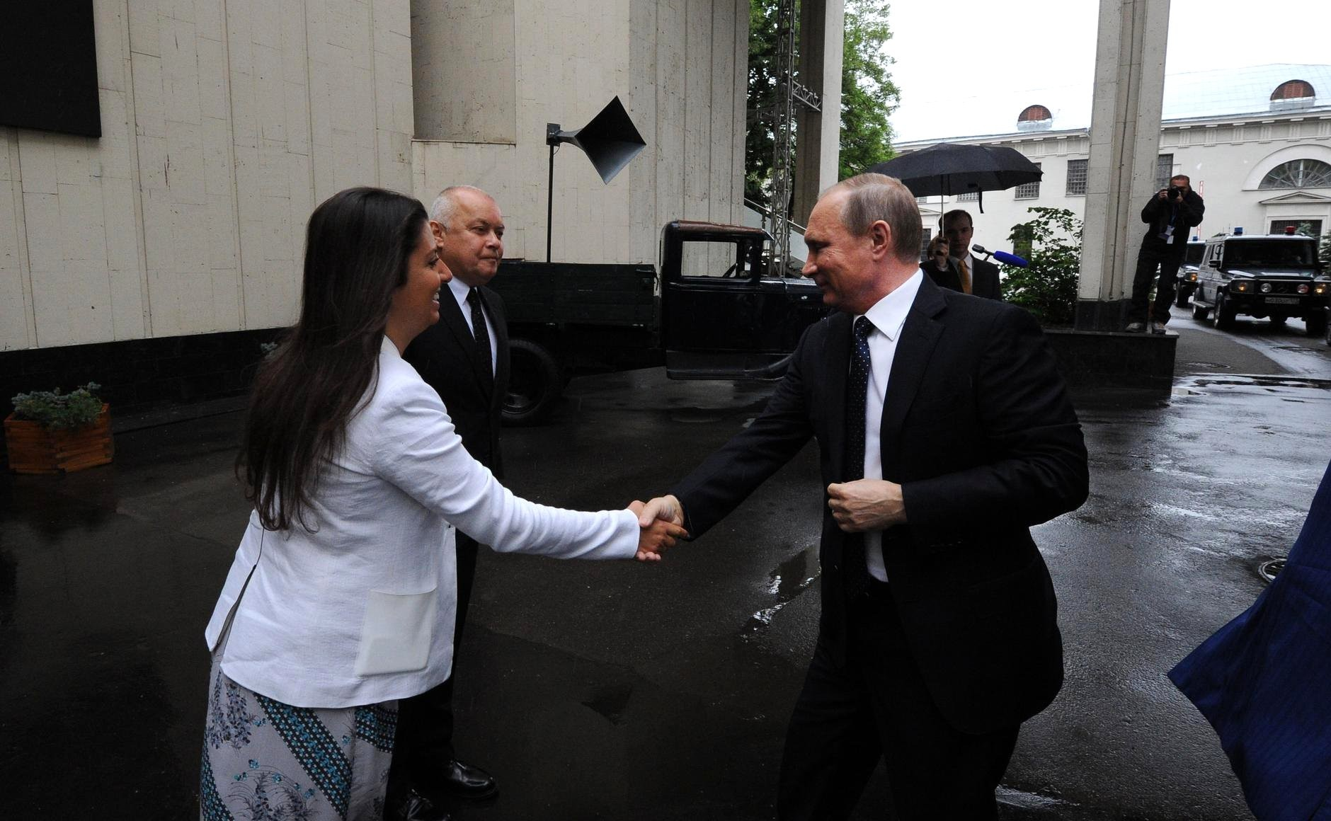 Перед началом посещения штаб-квартиры международного информационного агентства «Россия сегодня». С генеральным директором агентства Дмитрием Киселёвым и главным редактором Маргаритой Симоньян.